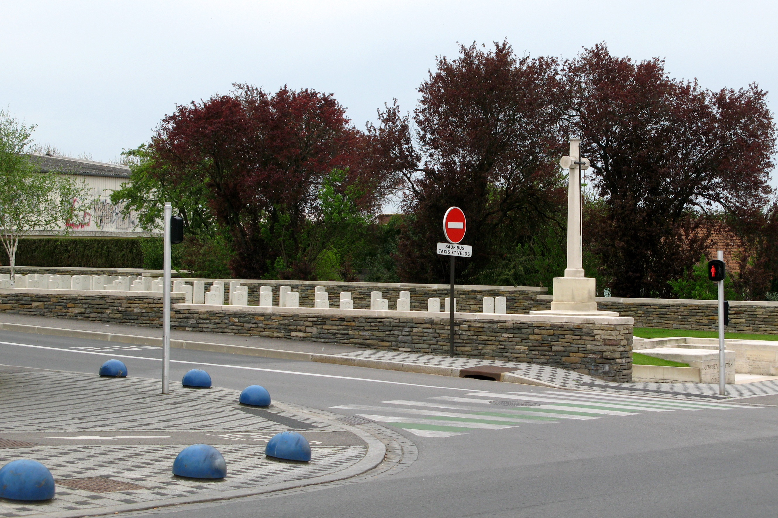 Longueau (Somme, France) - Le cimetière militaire du Commonwealth est à l'angle de l'avenue Henri Barbusse et de la rue des Alliés, à courte distance de l'hôtel-de-ville. . .